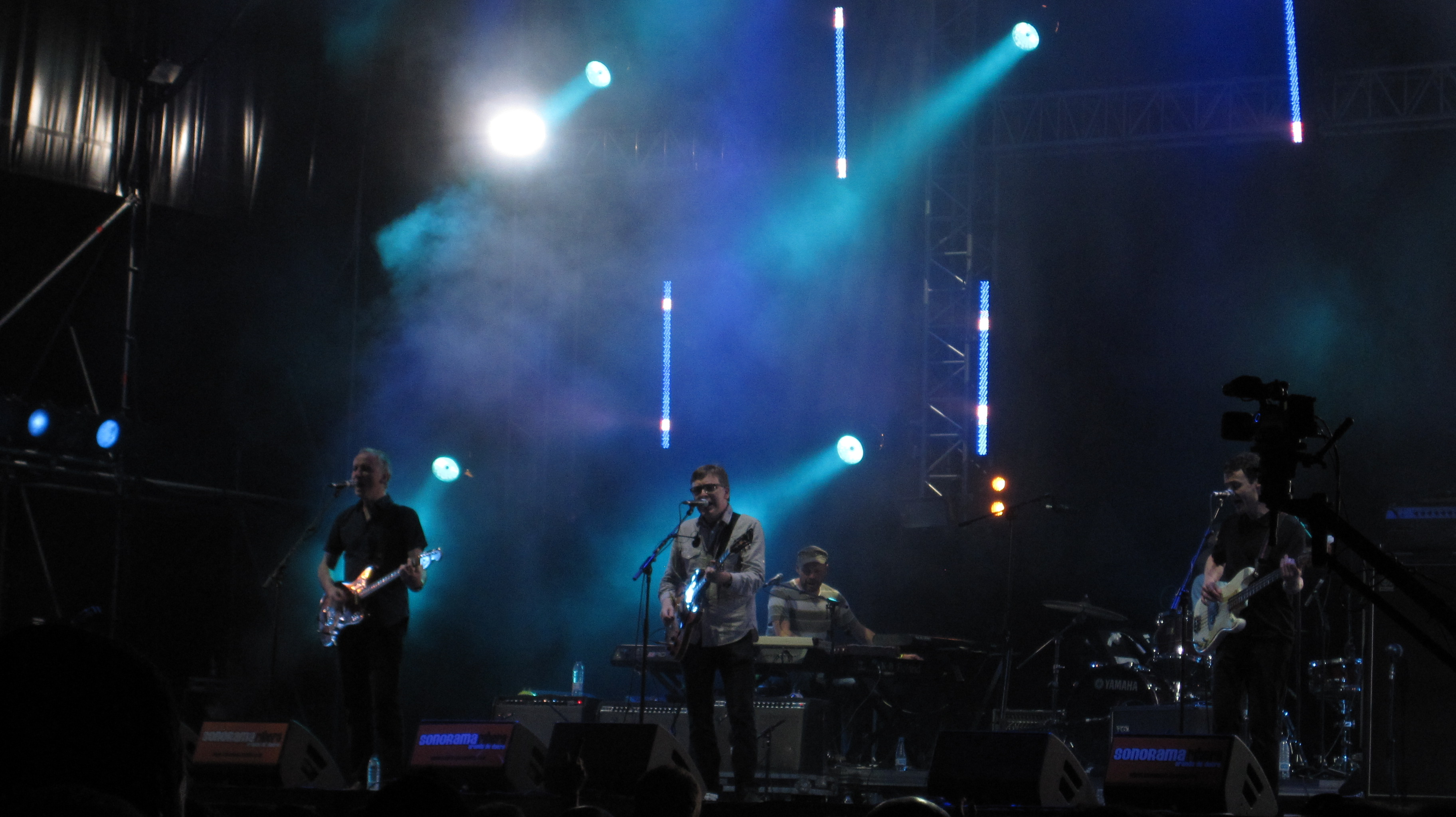 Teenage Fanclub en Sonorama Ribera 2011, Aranda de Duero (Burgos, España).